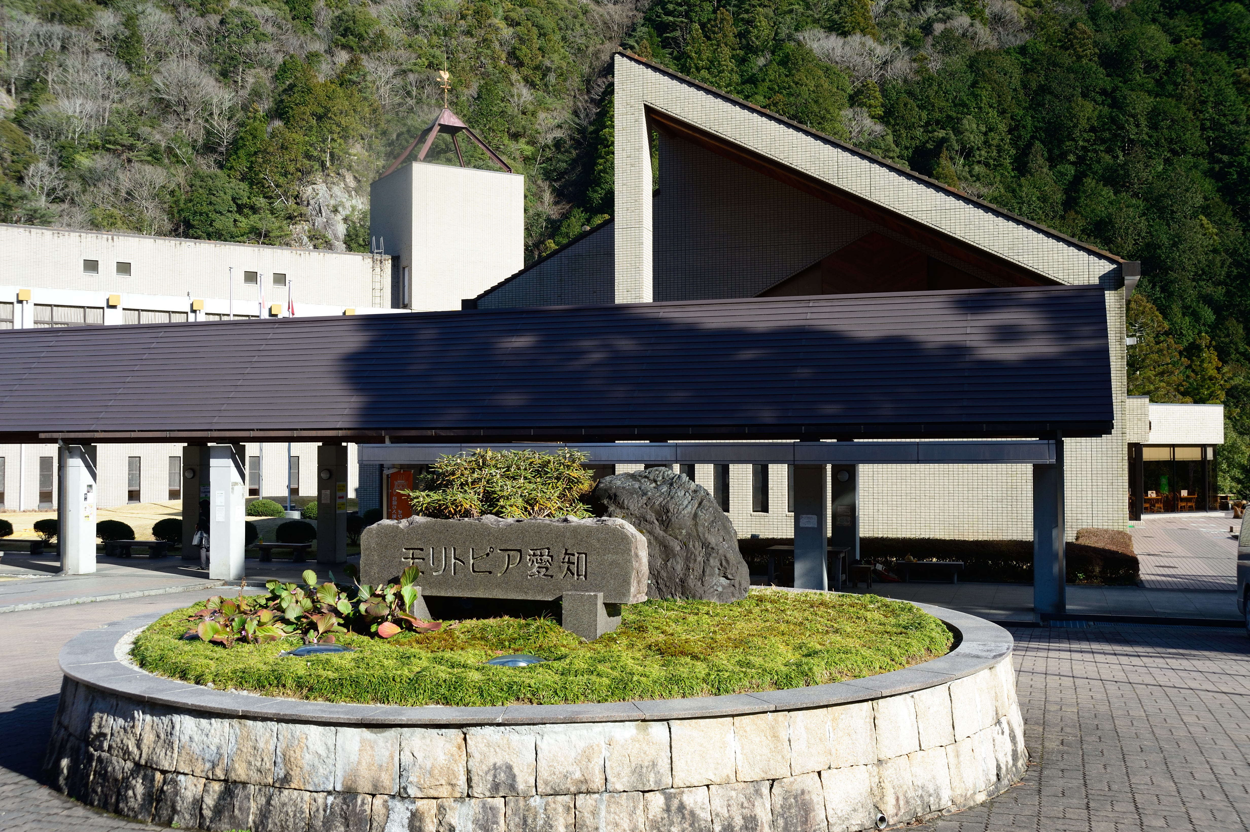 モリトピア愛知